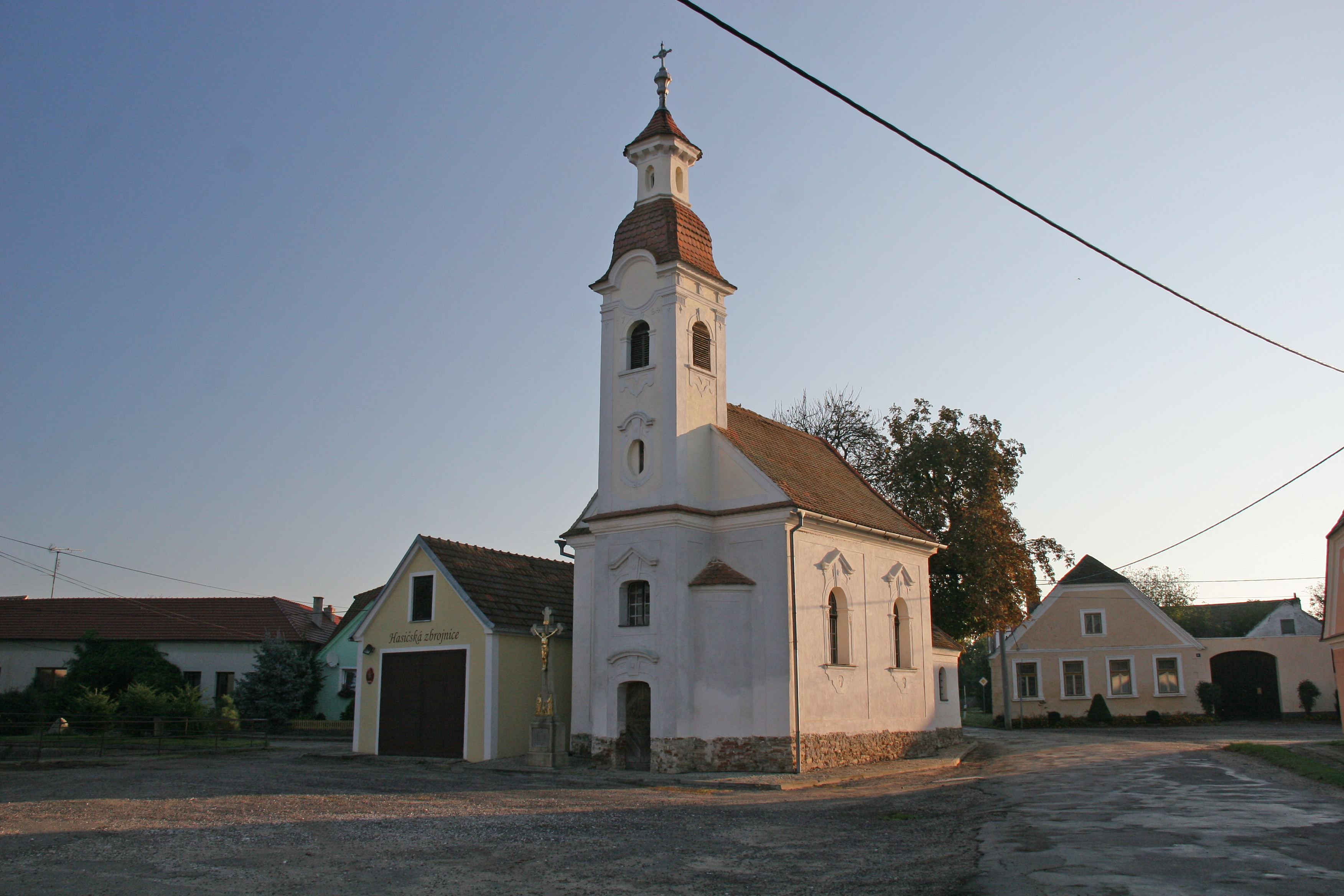 Kaple svatého Michala, náves, Vracovice (okres Znojmo).